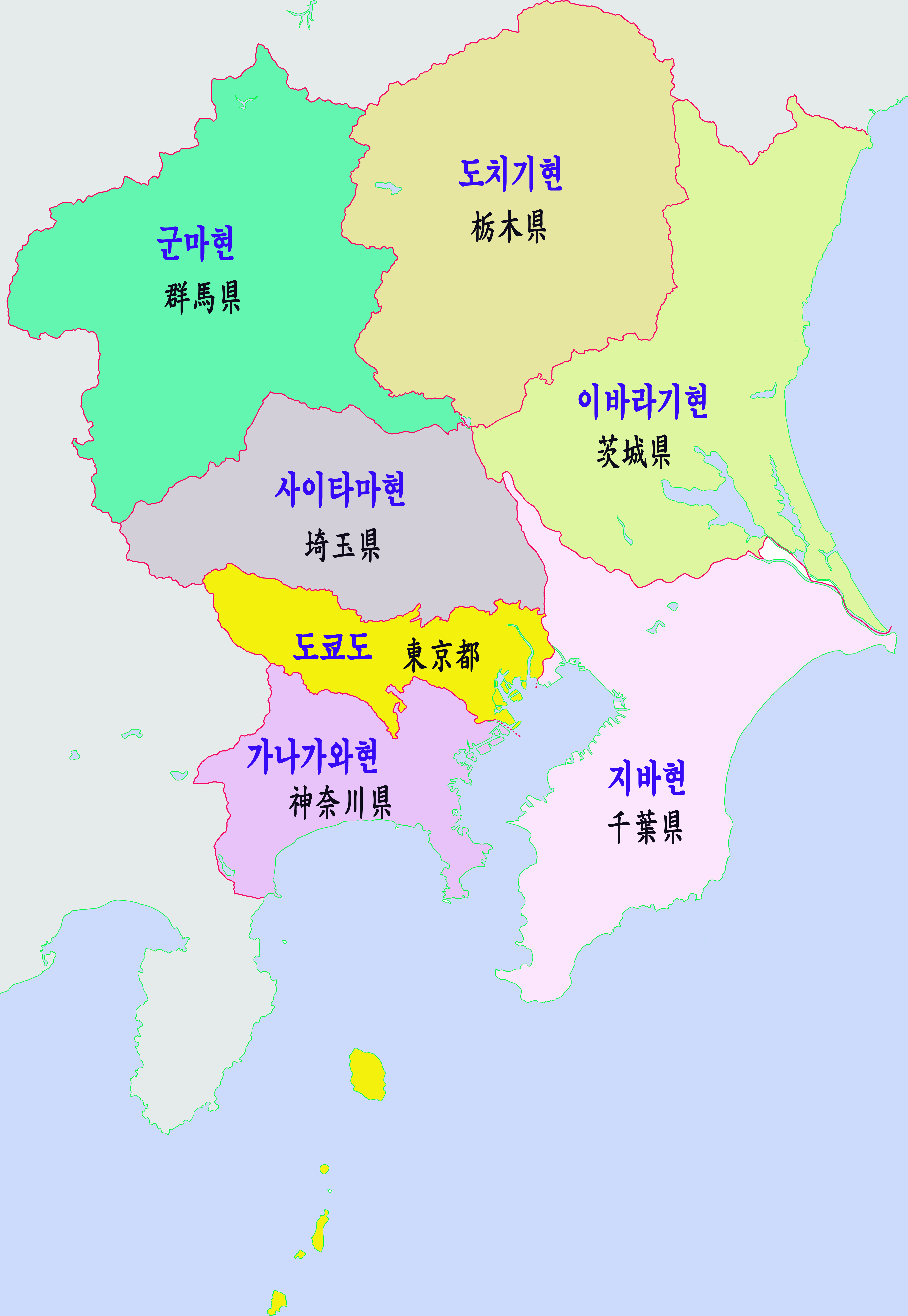 간토지방의 구역구분도